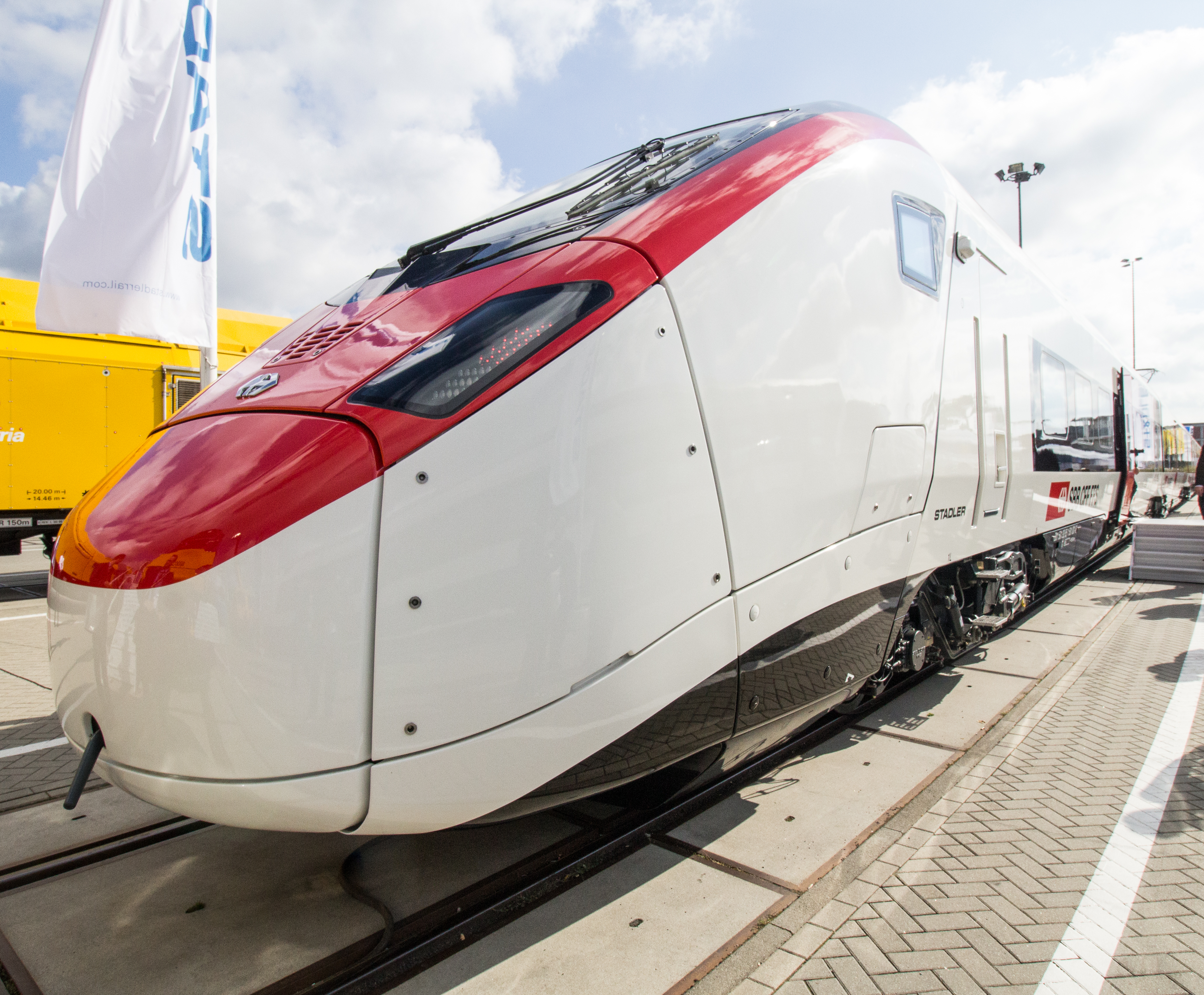 Stadler EC250 - innoTrans 2016